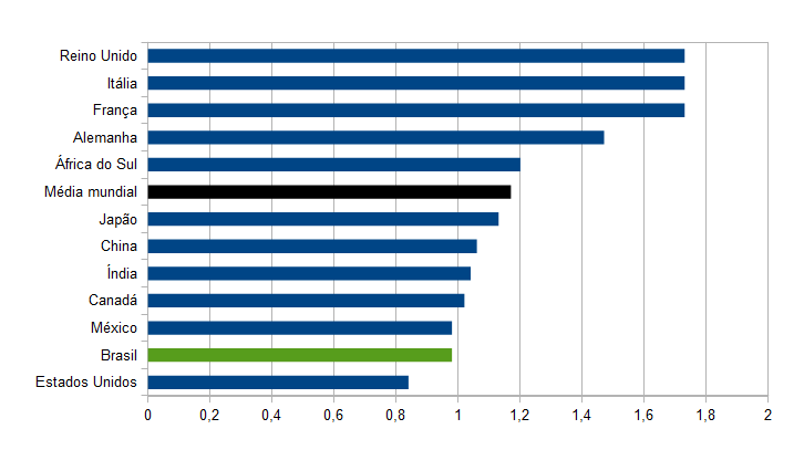 Gráfico em linhas mostrando o preço do diesel em US$ por litro pratico nos países do G8+5 e a média mundial em 21 e maio de 2018 segundo